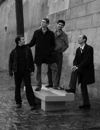 Photo du groupe Après l'amour prise sur les quais de Seine à Paris